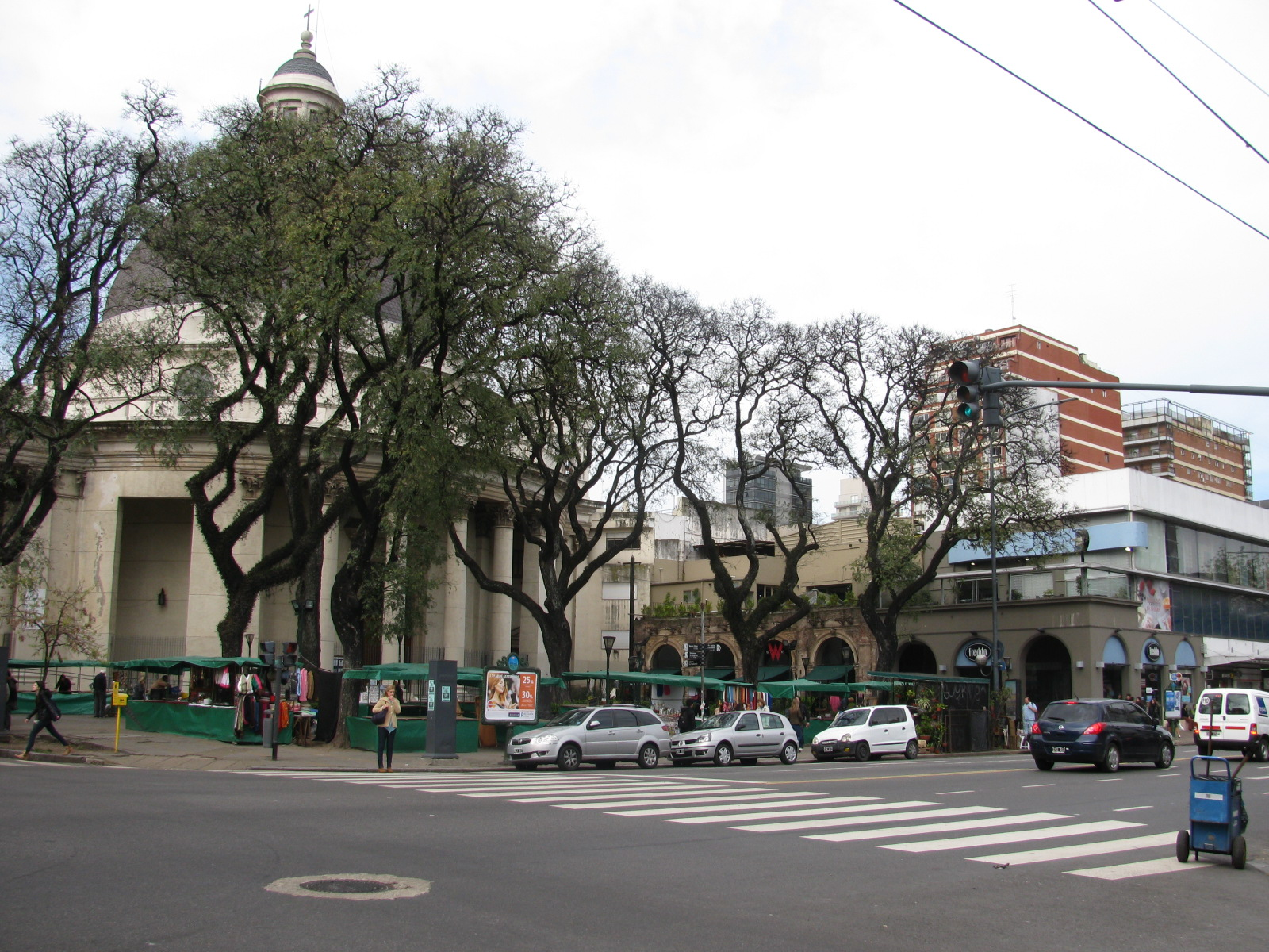 Vista exterior